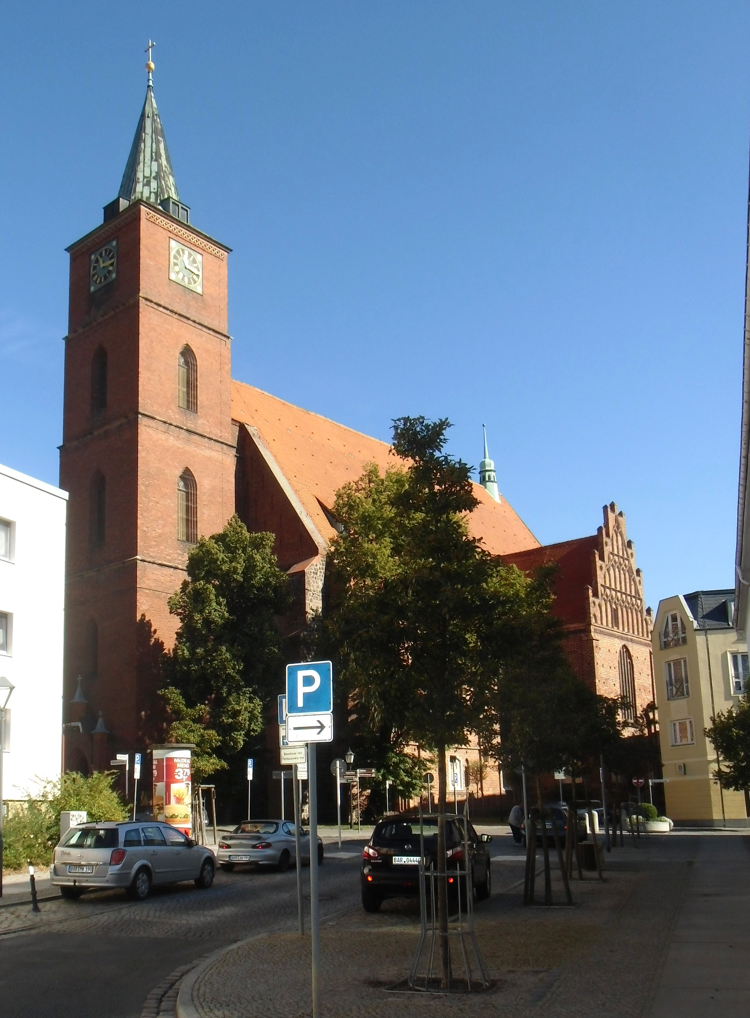 Denkmalgeschützte evangelische Stadtpfarrkirche. Ursprünglicher Feldsteinbau aus dem 13. Jahrhundert, im 15. Jahrhundert Umbau in eine gotische Hallenkirche. Nr. 40 der Liste der Baudenkmale in Bernau bei Berlin